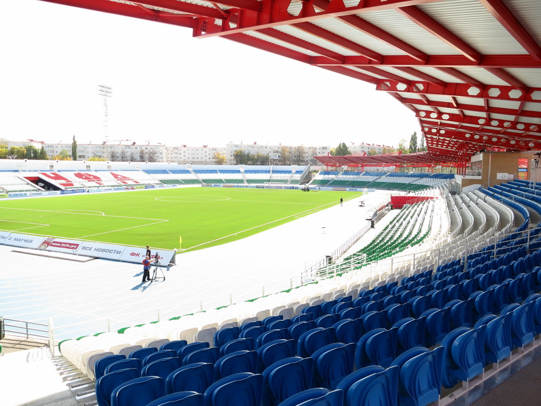 Стадион Нефтяник в г. Уфа, 14.09.2015г